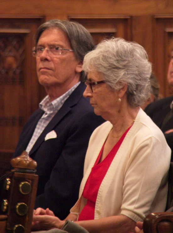 Muriel Casals i Josep Maria Flotats al lliurament de la Medalla d'Or de l'Ajuntament de Barcelona a Jordi Saval (2015)